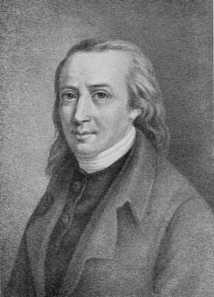 Matthias Claudius